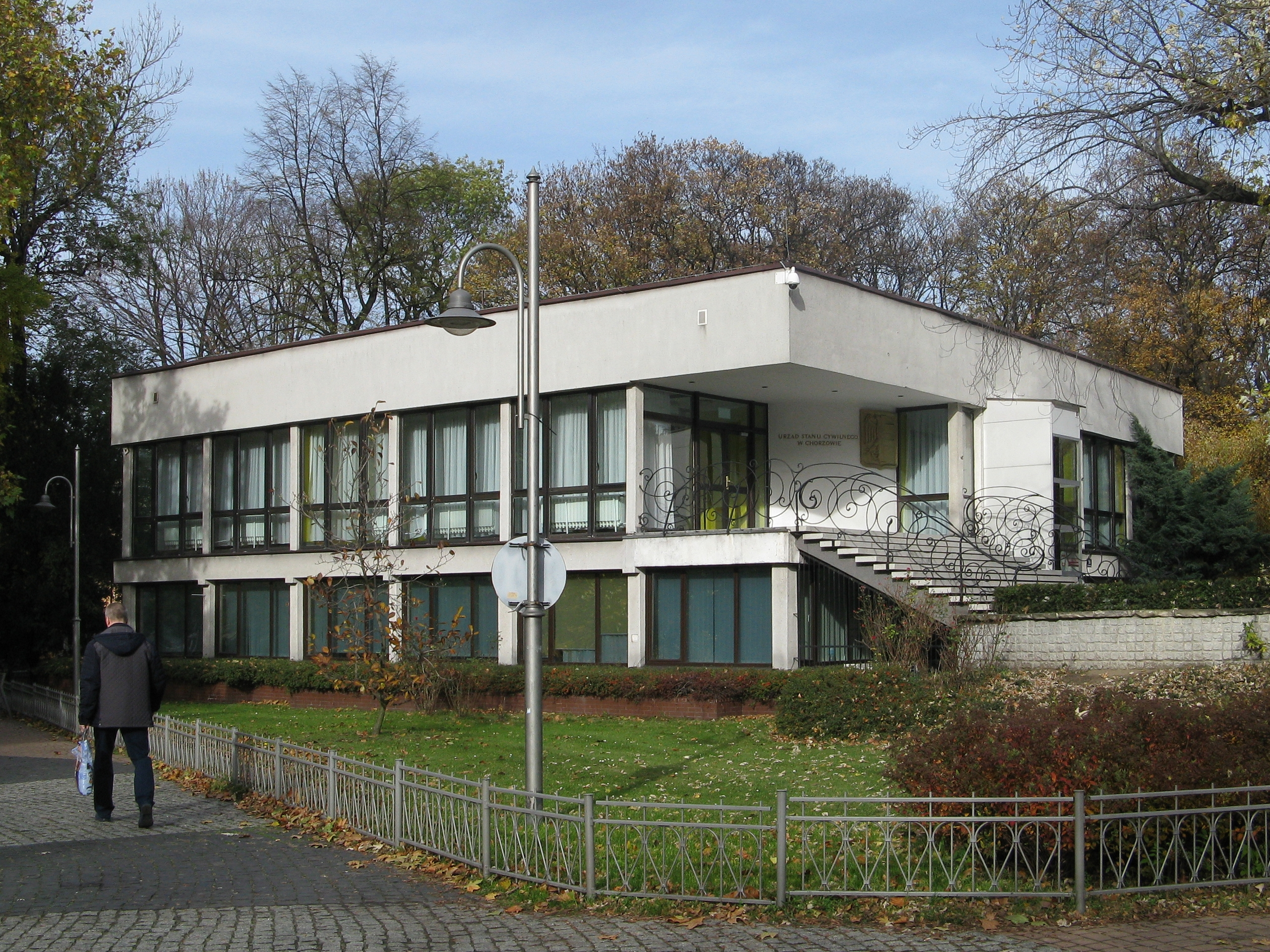 Budynek mieszczący urząd stanu cywilnego w Chorzowie, przy ul. Henryka Dąbrowskiego 24 w Parku Hutników.